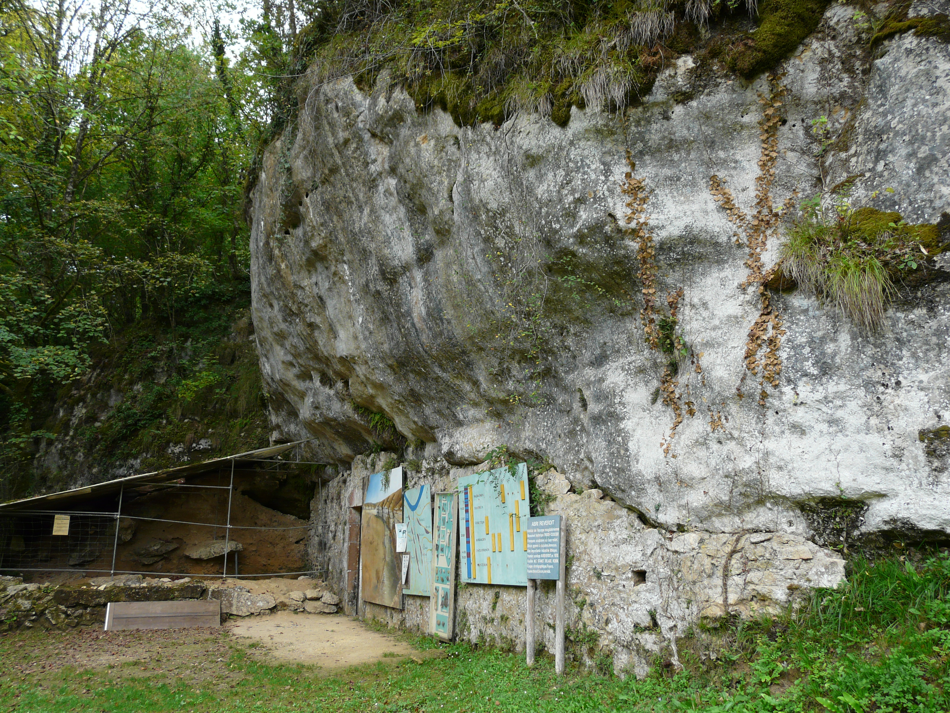 L'abri Reverdit, site préhistorique sur la commune de Sergeac, dans le vallon de Castel Merle, Dordogne, France. .